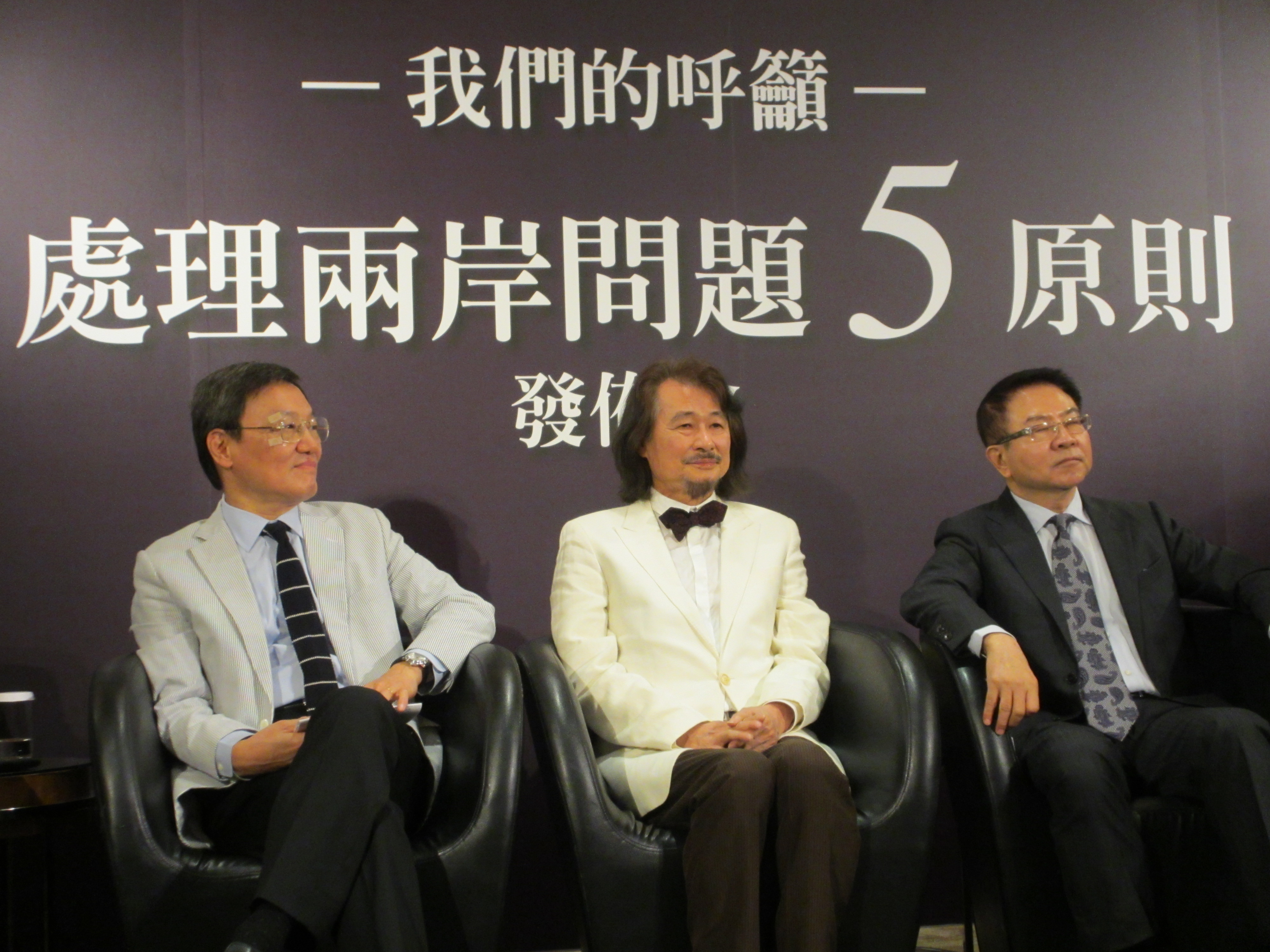 台灣跨黨派人士和學者舉辦「處理兩岸問題五原則」發佈會。左起：蘇起、施明德、洪奇昌。